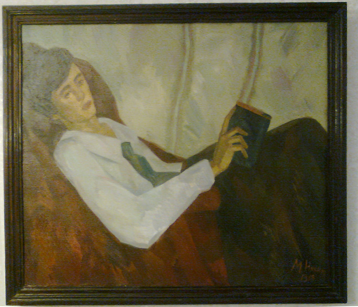 Marina Tsvetaeva's museum (Moscow)